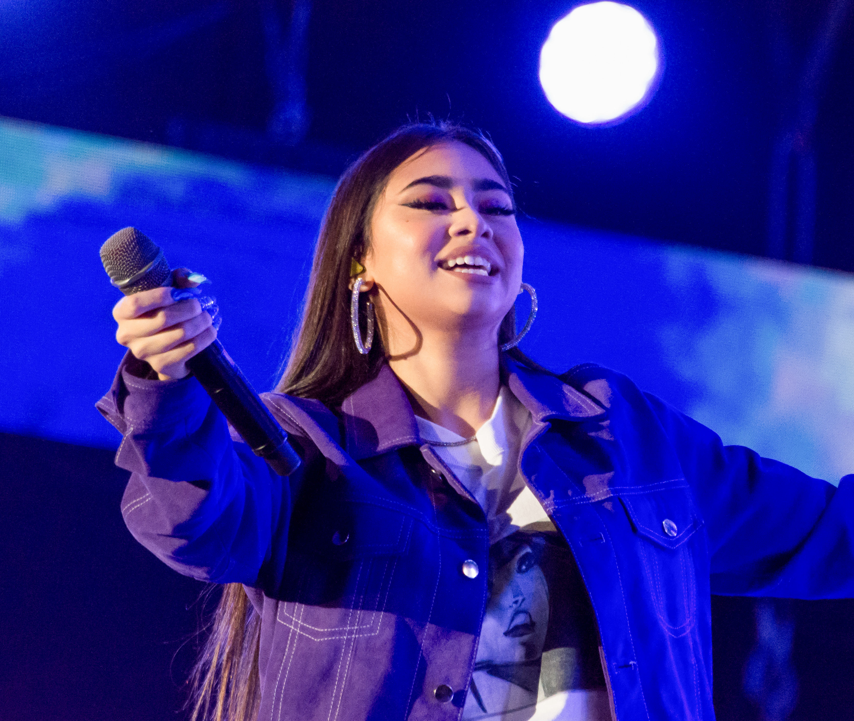 Festival de Las Condes 2020, Parque Padre Hurtado, La Reina, Santiago, Región Metropolitana, Chile